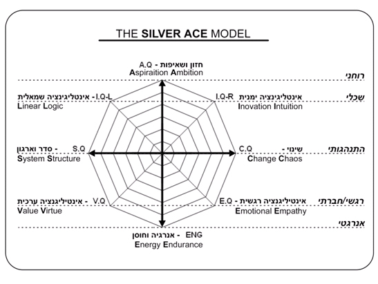 מודל סילבר אייס של ד"ר דב ינאי